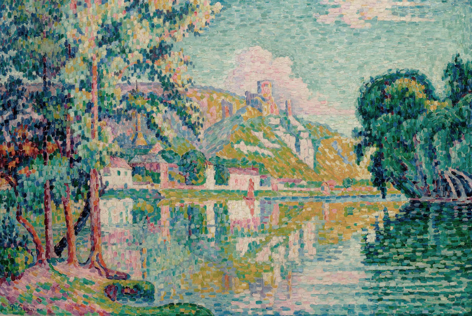 Les Andelys. Château-Gaillard by Paul Signac, 1921, oil on canvas. 73x92 cm.